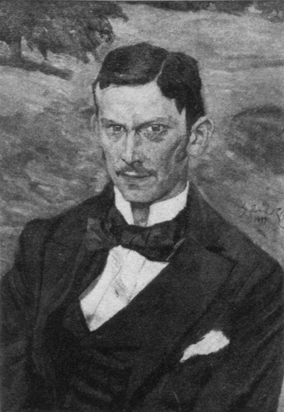 Porträt von Levin Ludwig Schücking, Enkel von Levin Schücking.